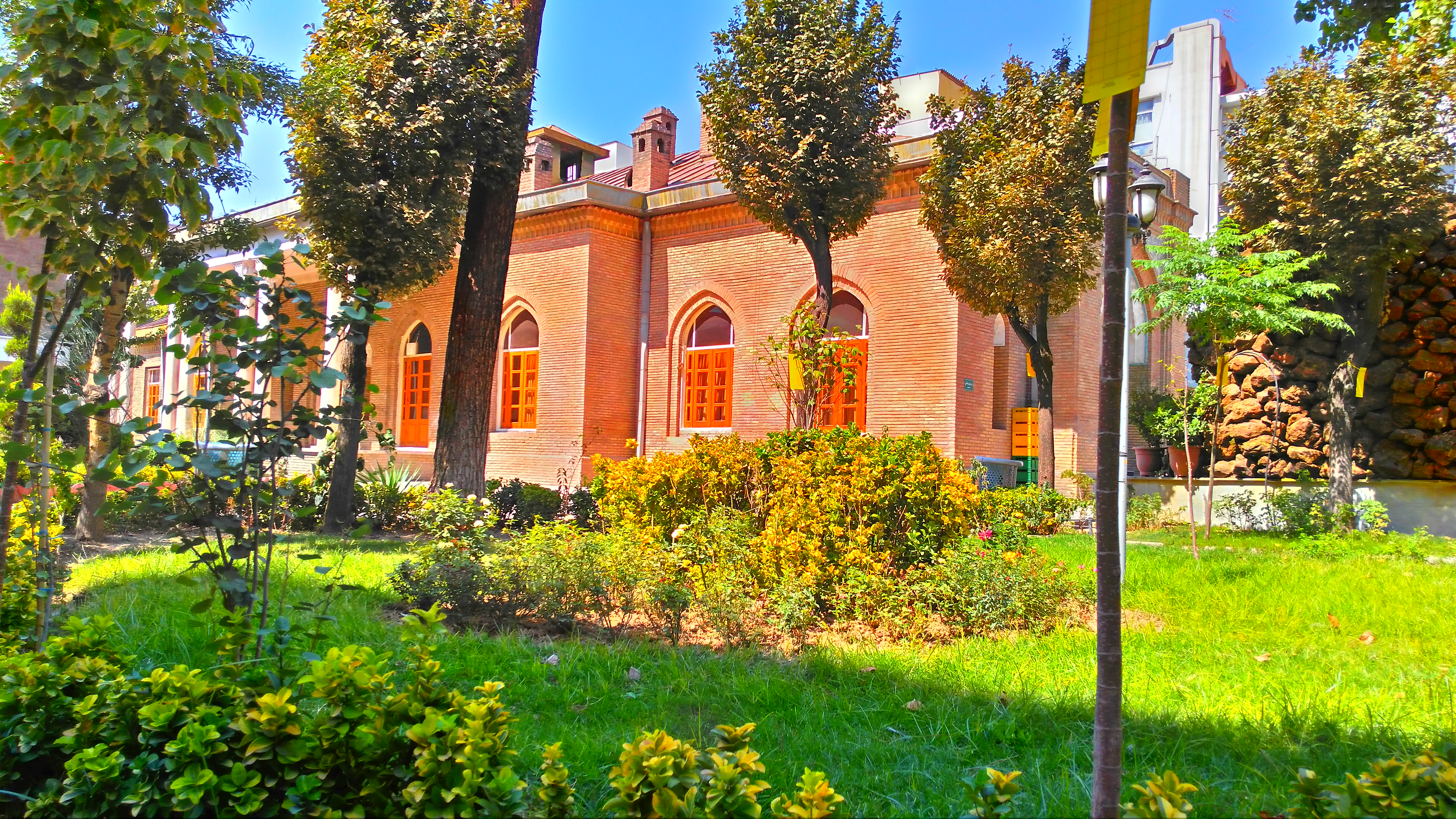 بیمارستان نجمیه